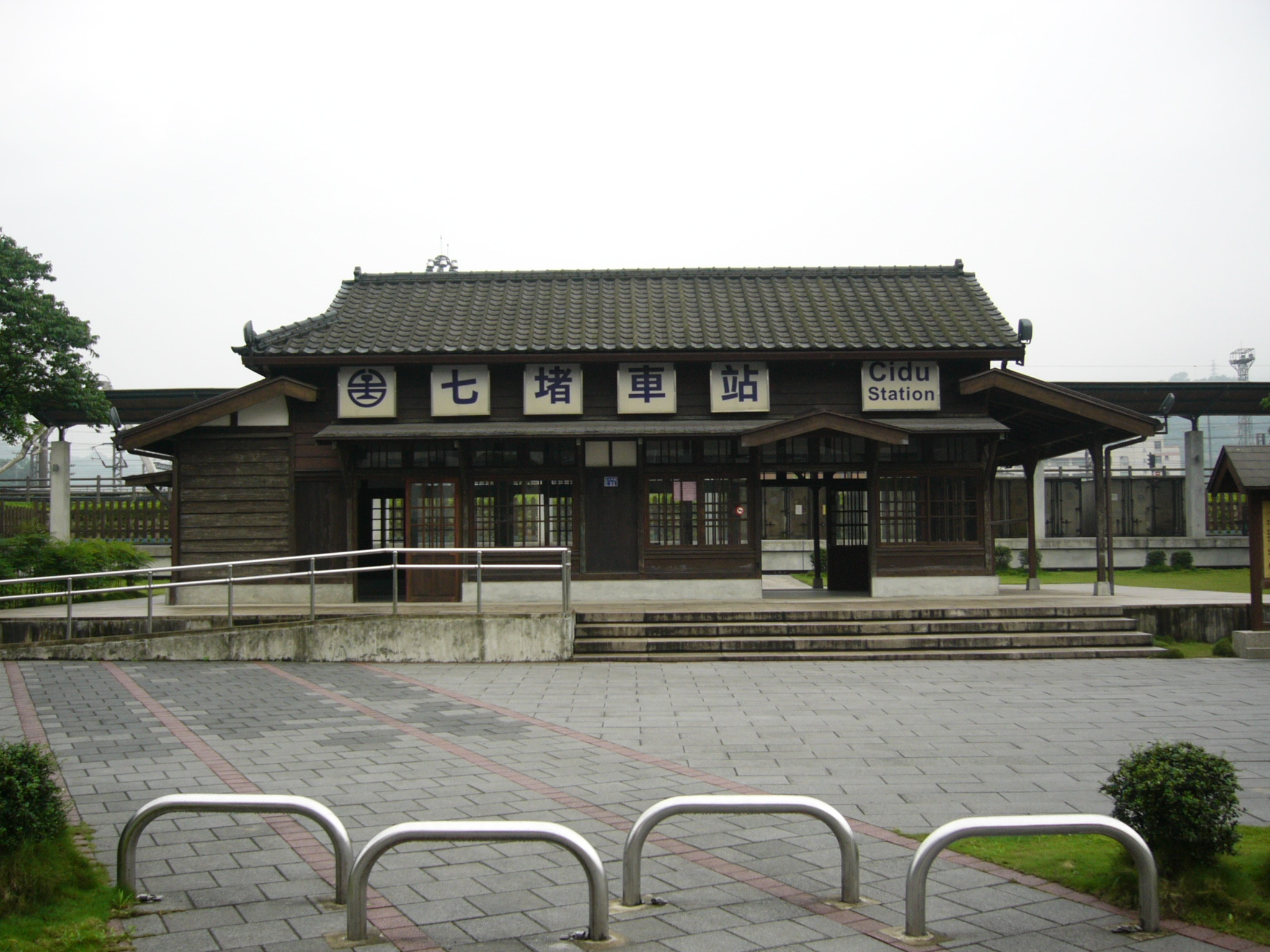 中文（台灣）: 原臺灣鐵路管理局七堵前站正面外觀。